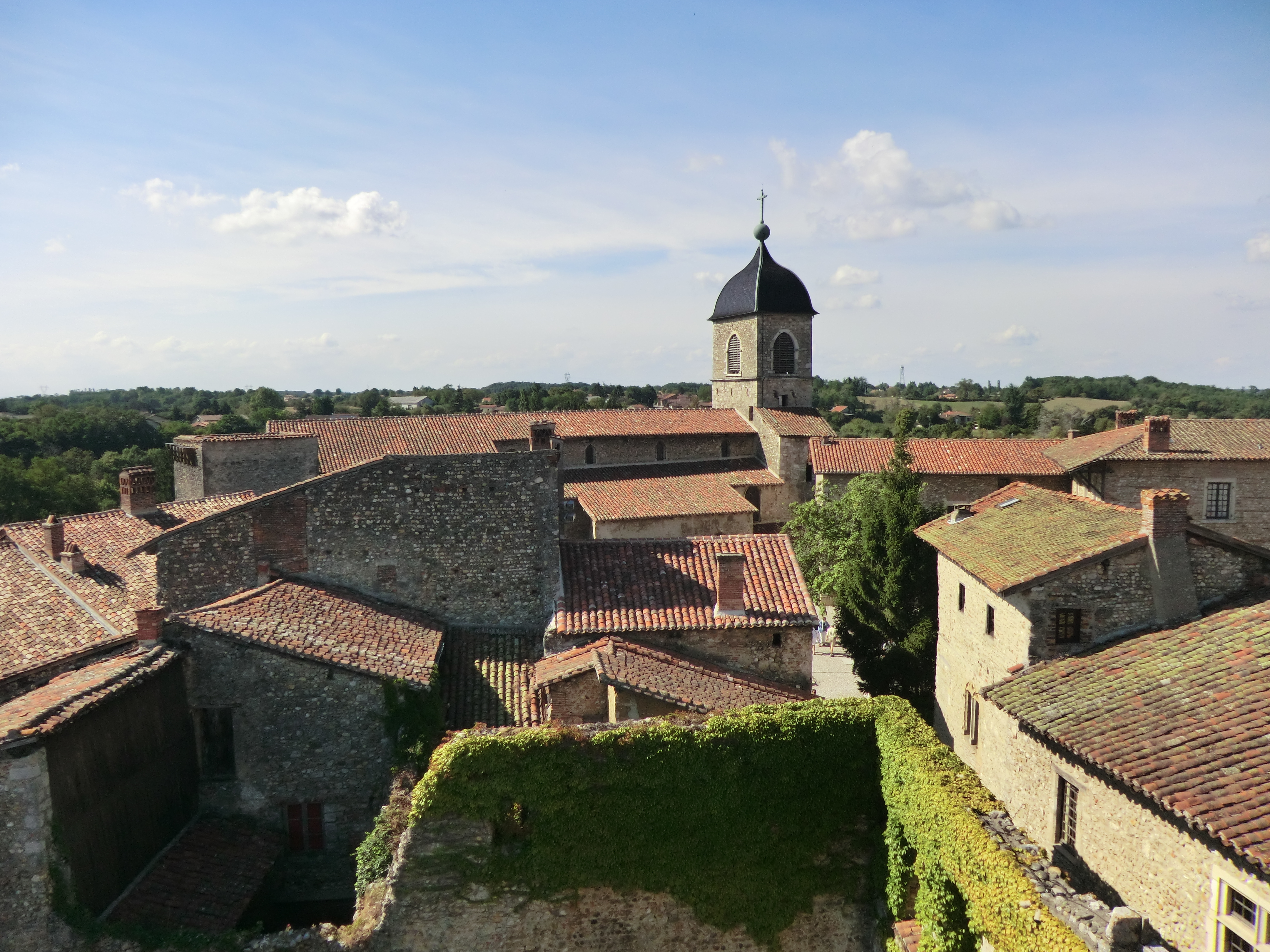 Vue de l'église-forteresse de Pérouges depuis la tour de guet. .